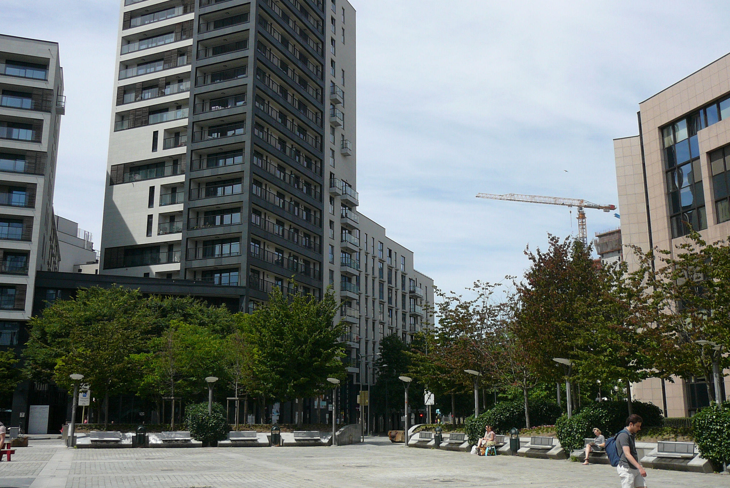 Place Jean Rey, à Etterbeek, Région bruxelloise, Belgique